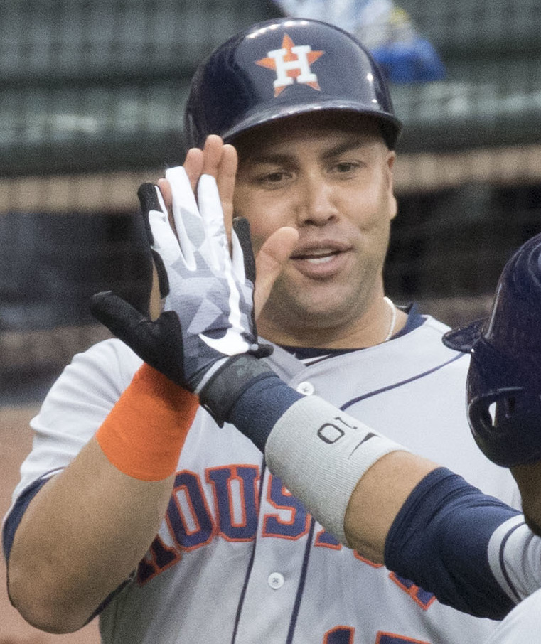 Astros at Orioles 7/21/17